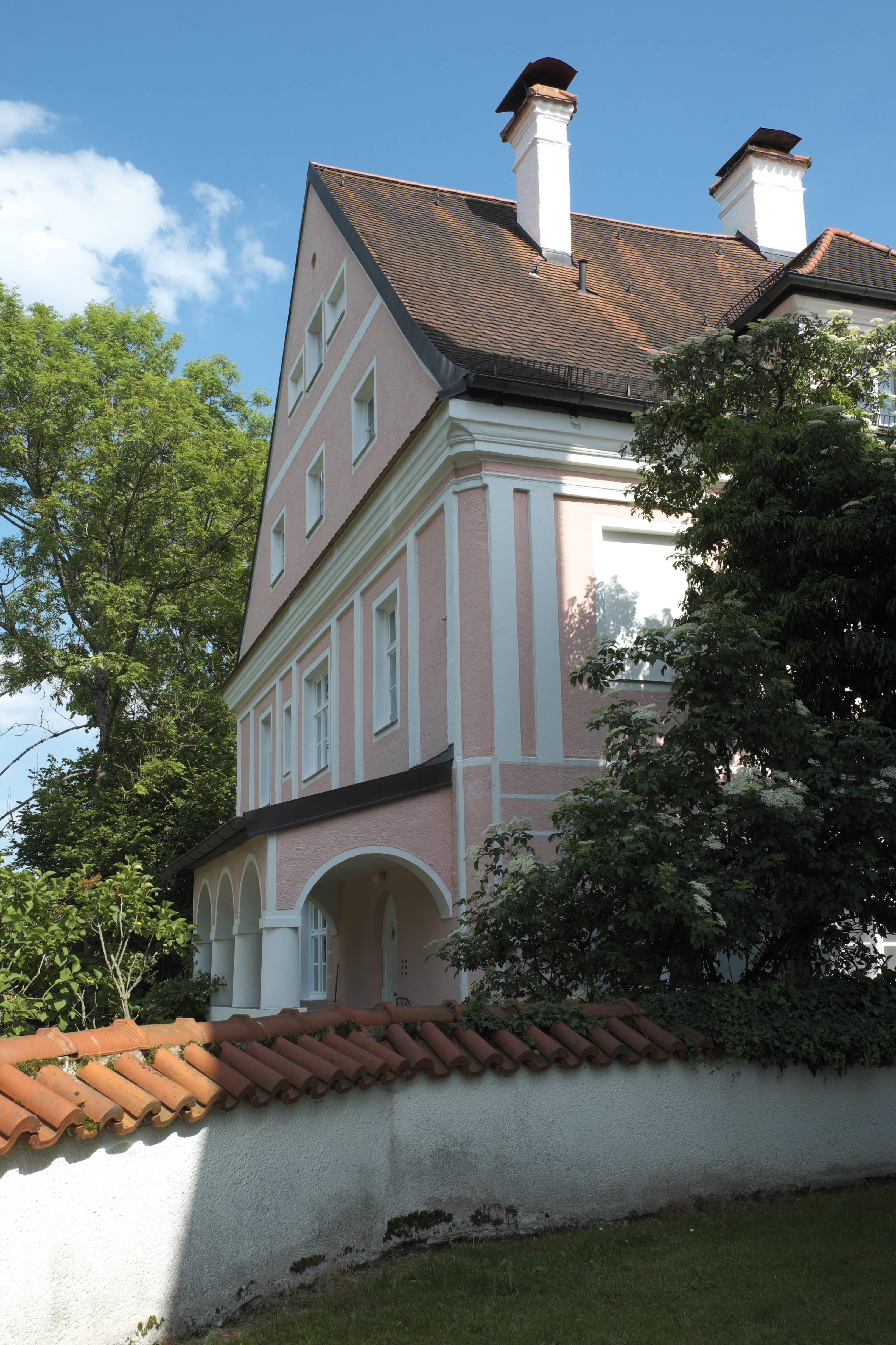 Schlösschen, auch Benefiziatenhaus, in Kreuzpullach (Oberhaching) im Landkreis München (Bayern, Deutschland)